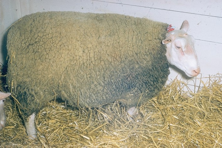 Berrichon